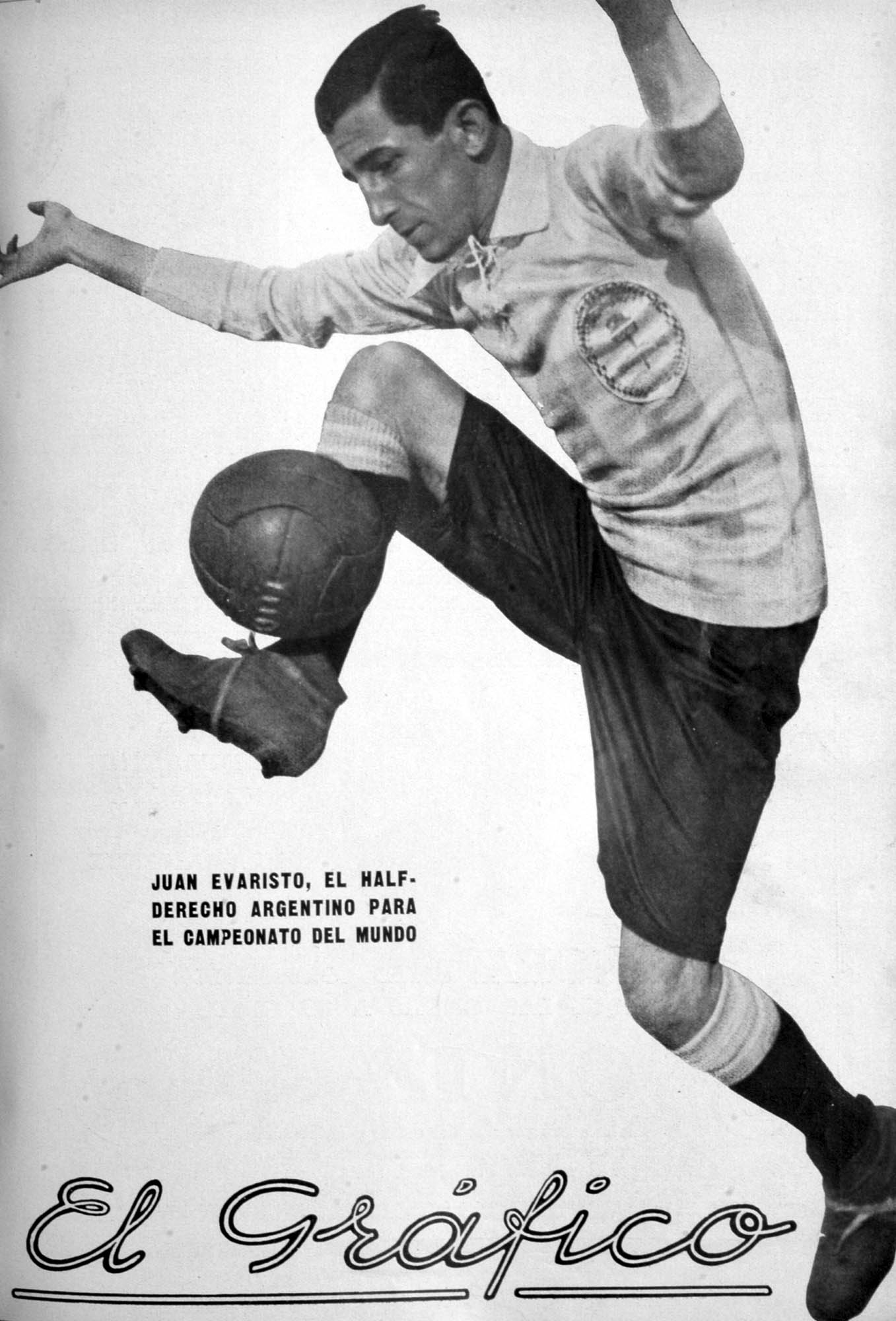 El Grafico del 05 de Julio de 1930. Edicion 573